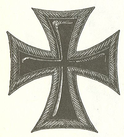 Scan van Blz. 294 van het boek "Handbuch der Ritter- und Verdienstorden " uitgegeven 1893 door Weber.Tekening van de in 1902 overleden Maximilian Gritzner. Robert Prummel 10 jul 2008 16:40 (CEST)